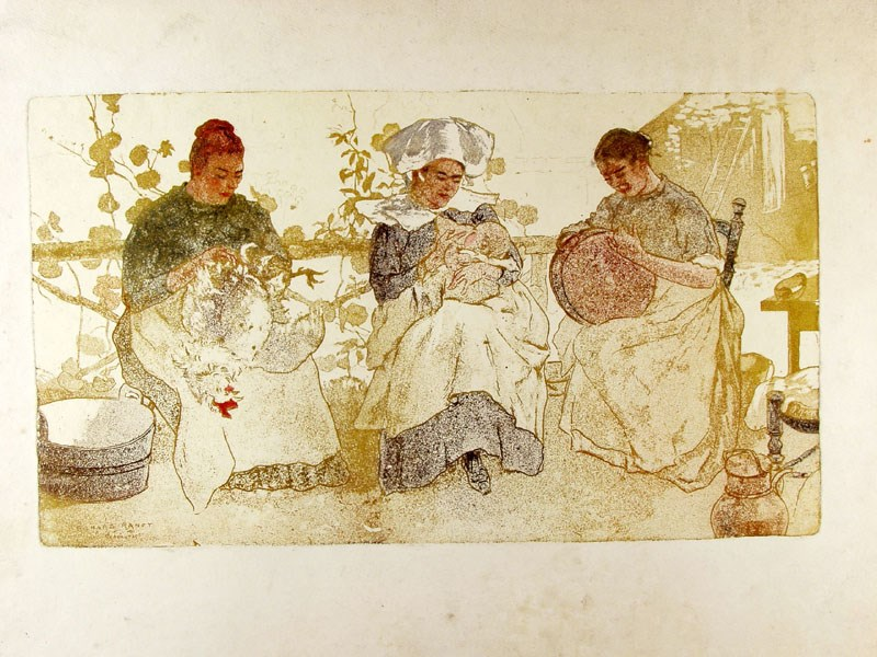 Trois Bretonnes alignées : l'une plume un coq, l'autre, en costume traditionnel de la région fouesnantaise (mode de Rosporden), allaite un bébé, la troisième confectionne un panier. (Musée départemental breton)